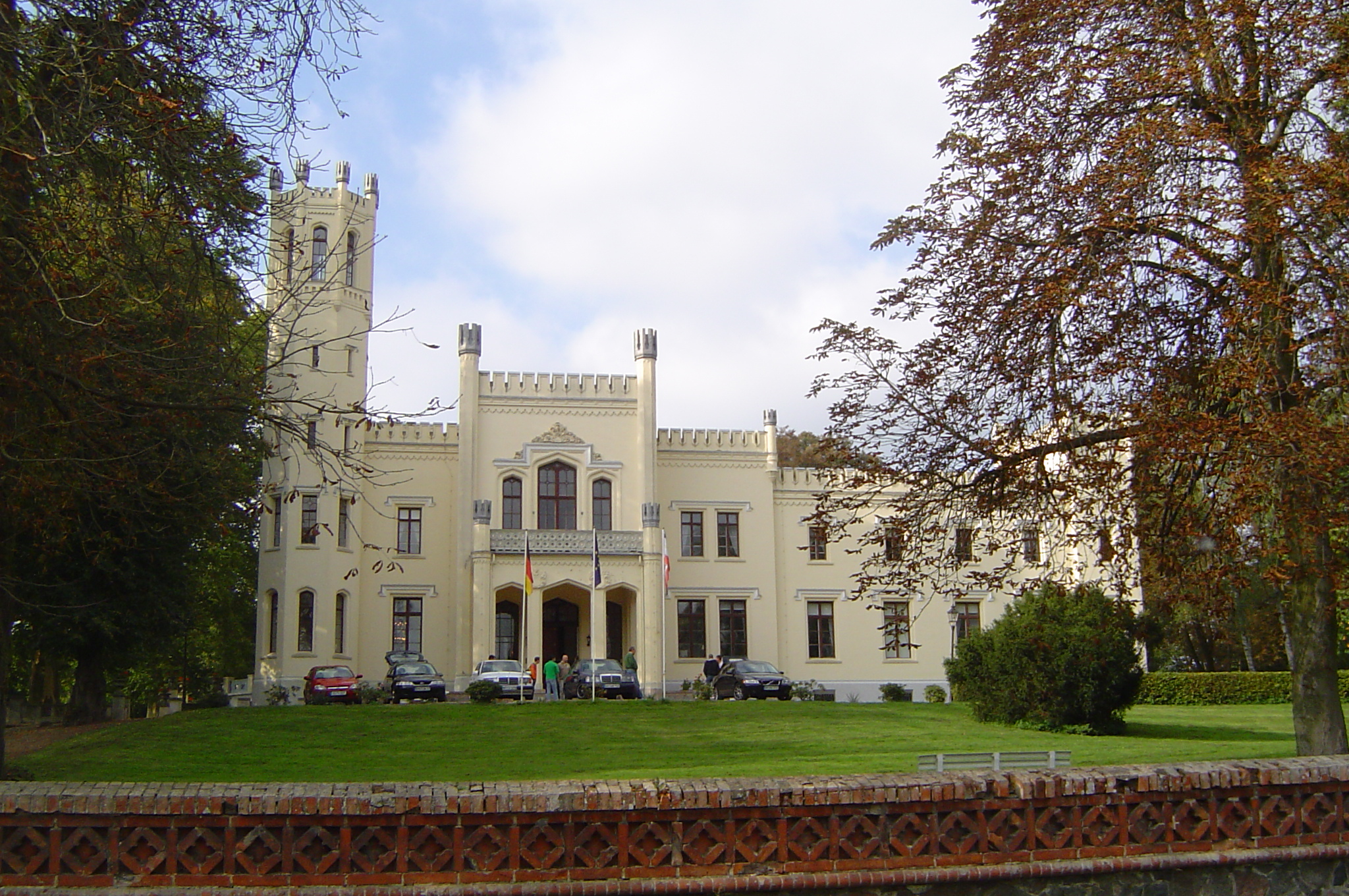 Schloss Kittendorf, im Landkreis Demmin, Mecklenburg-Vorpommern. (Nach Plänen von Friedrich Hitzig)